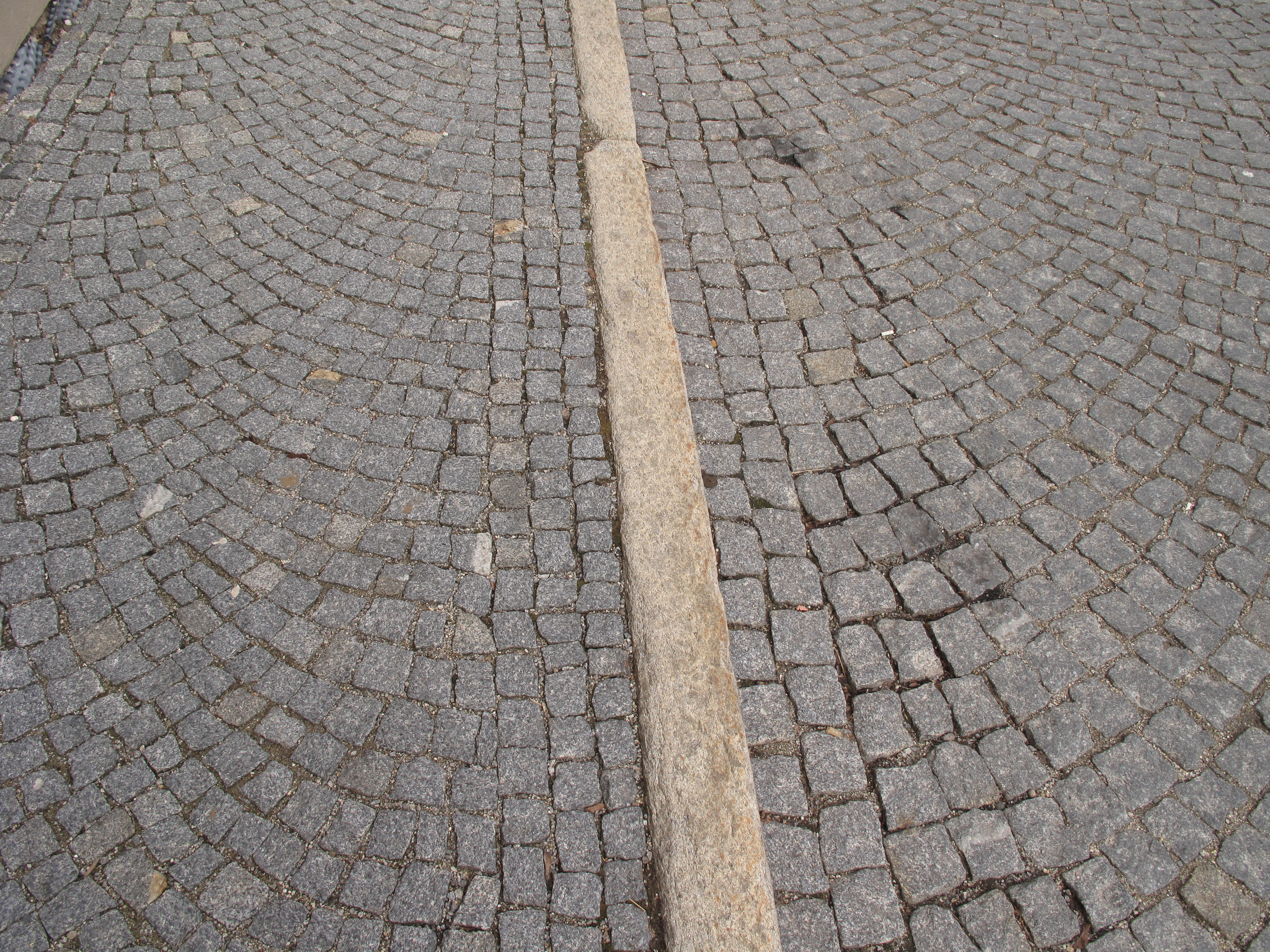 Ulice Husova v Prachaticích. Česká republika.